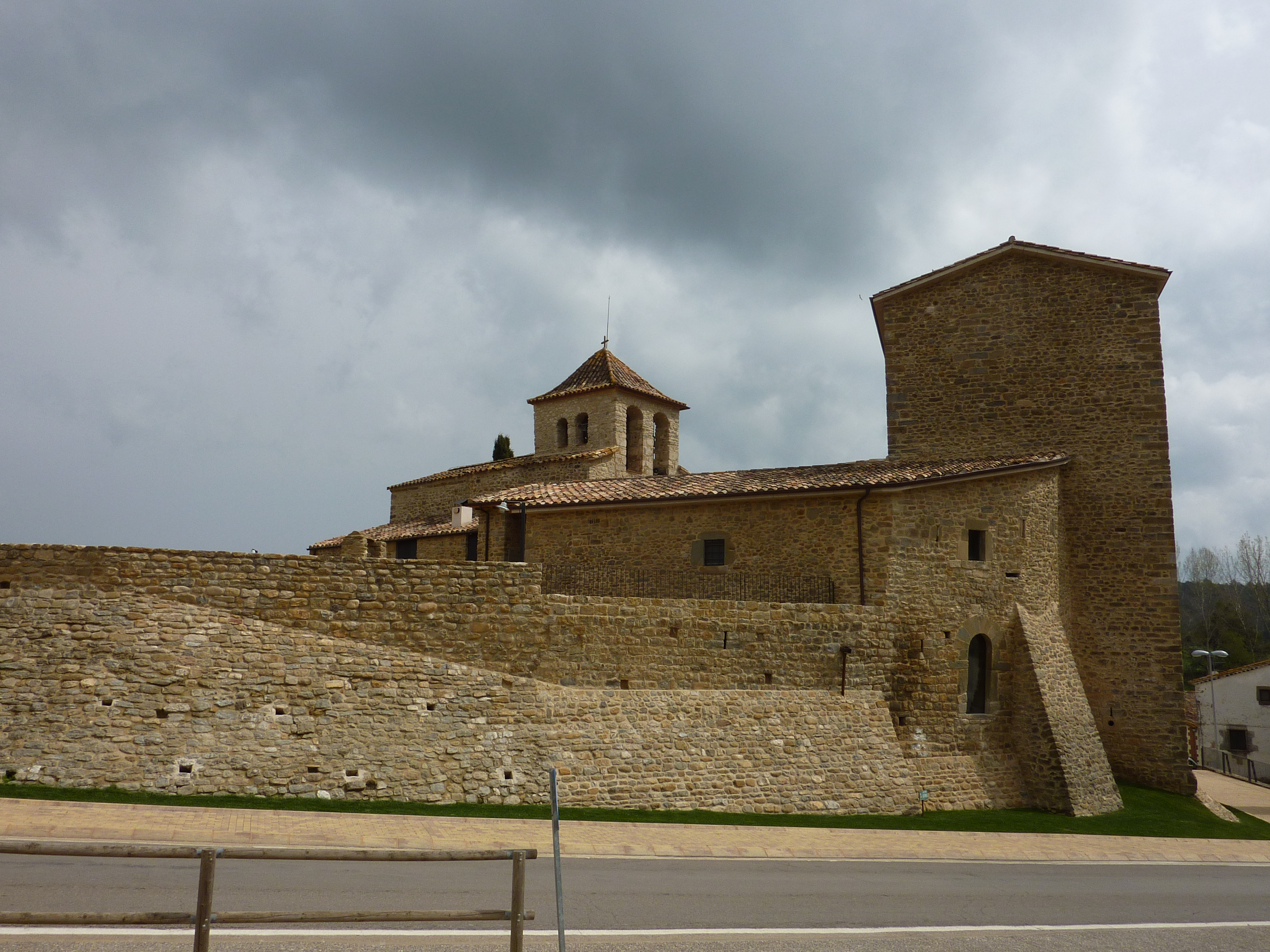 Castell de Palol de Revardit